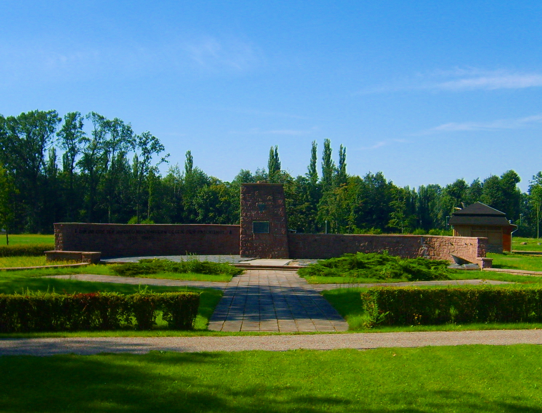 Mahnmal im Schlosspark Lauchhammer-West